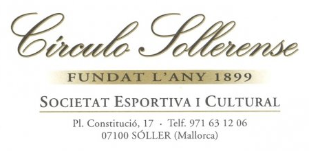 Capçalera Círculo Sollerense